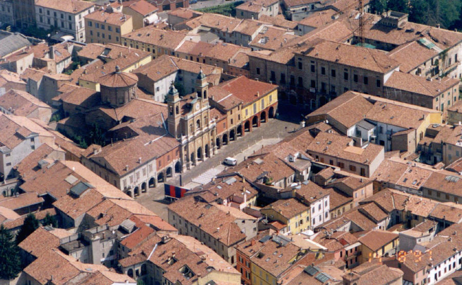 Guastalla (provincia di Reggio Emilia): piazza Mazzini, veduta aerea